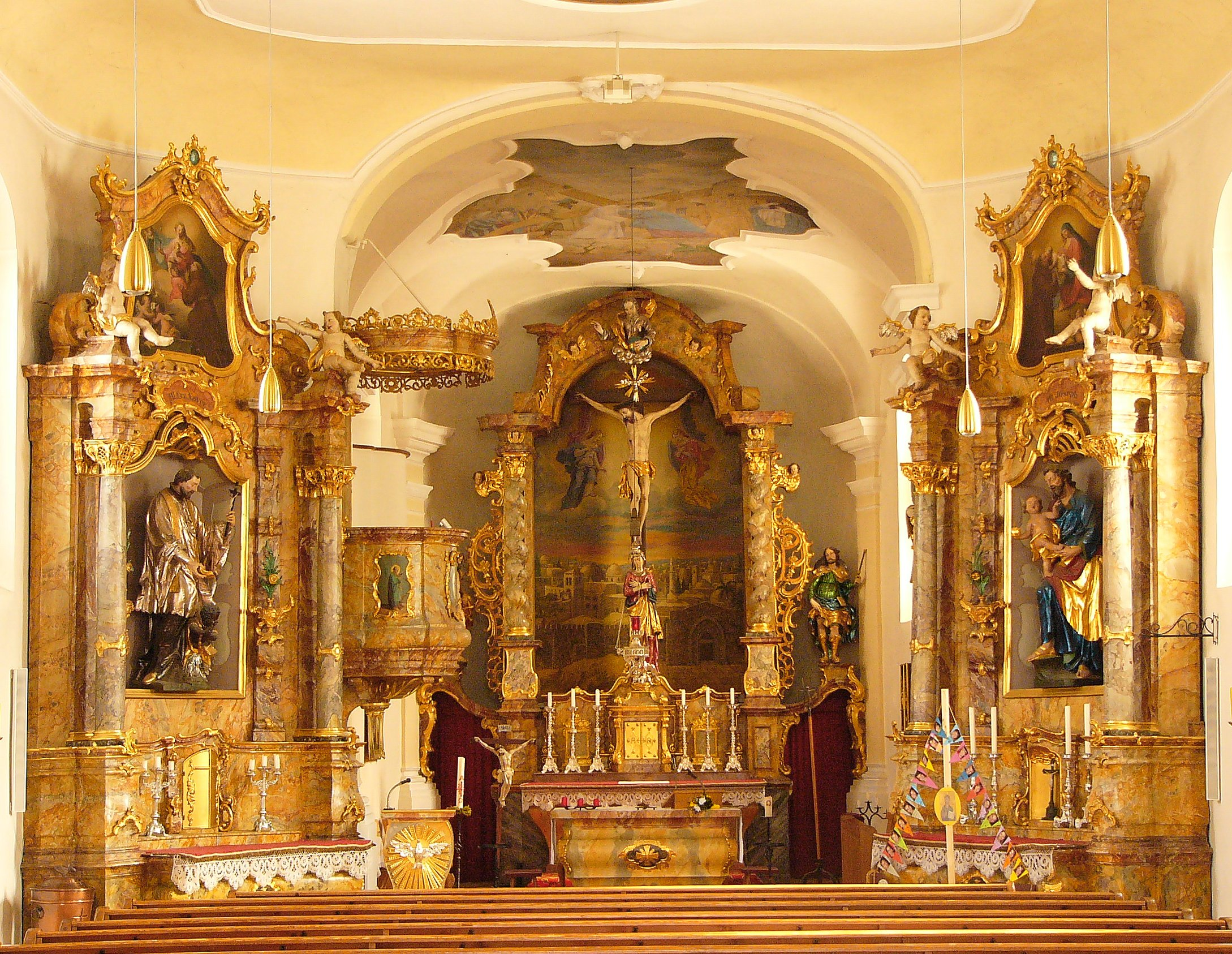 Kath. Filialkirche St. Maria Dolorosa; 15. Jahrhundert, Mitte 18. Jahrhundert barockisiert, Turm spätgotisch; mit Ausstattung.This is a photograph of an architectural monument.